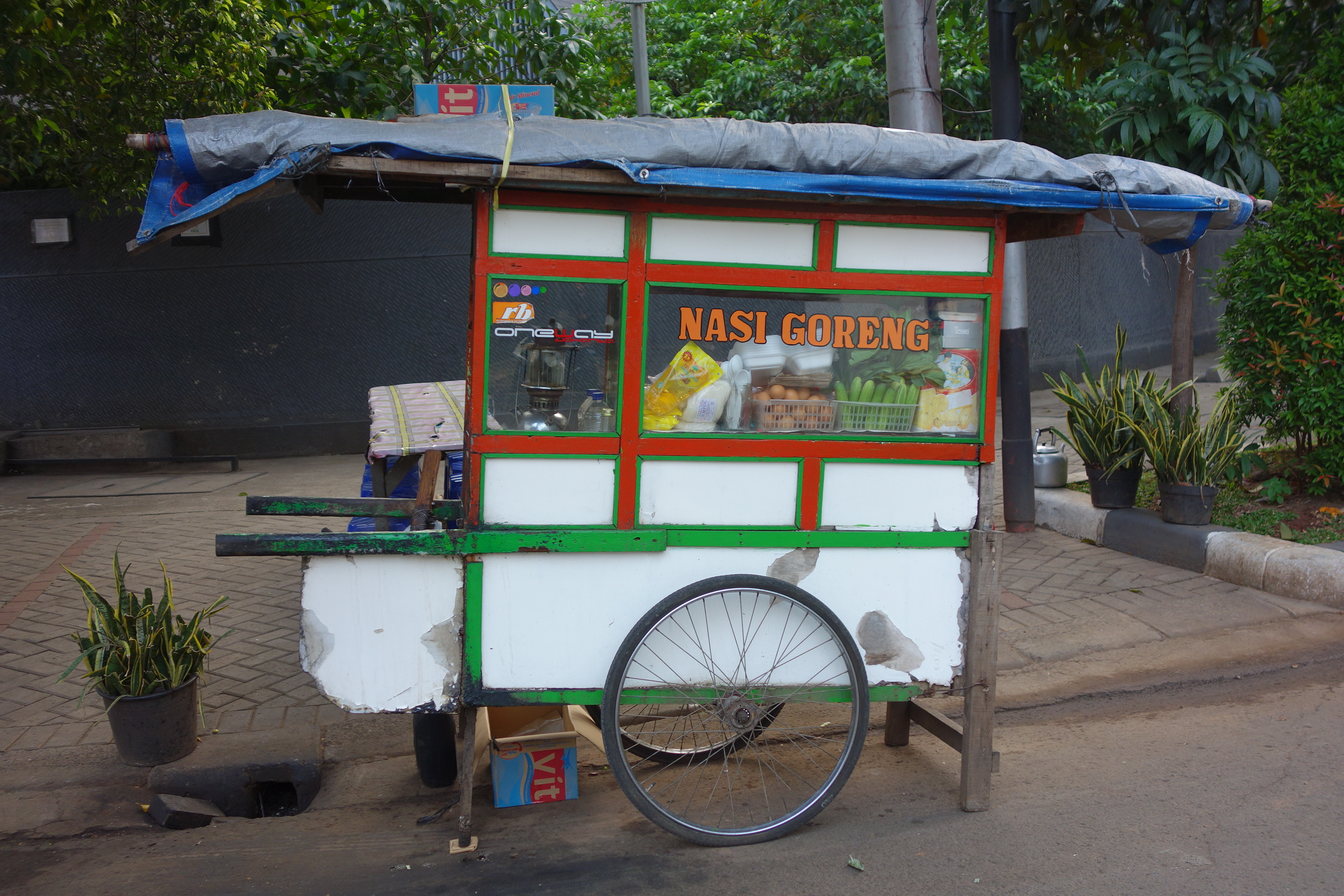 Street vendor in Jakarta selling nasi goreng